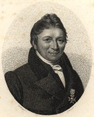 Ernst Daniel August Bartel